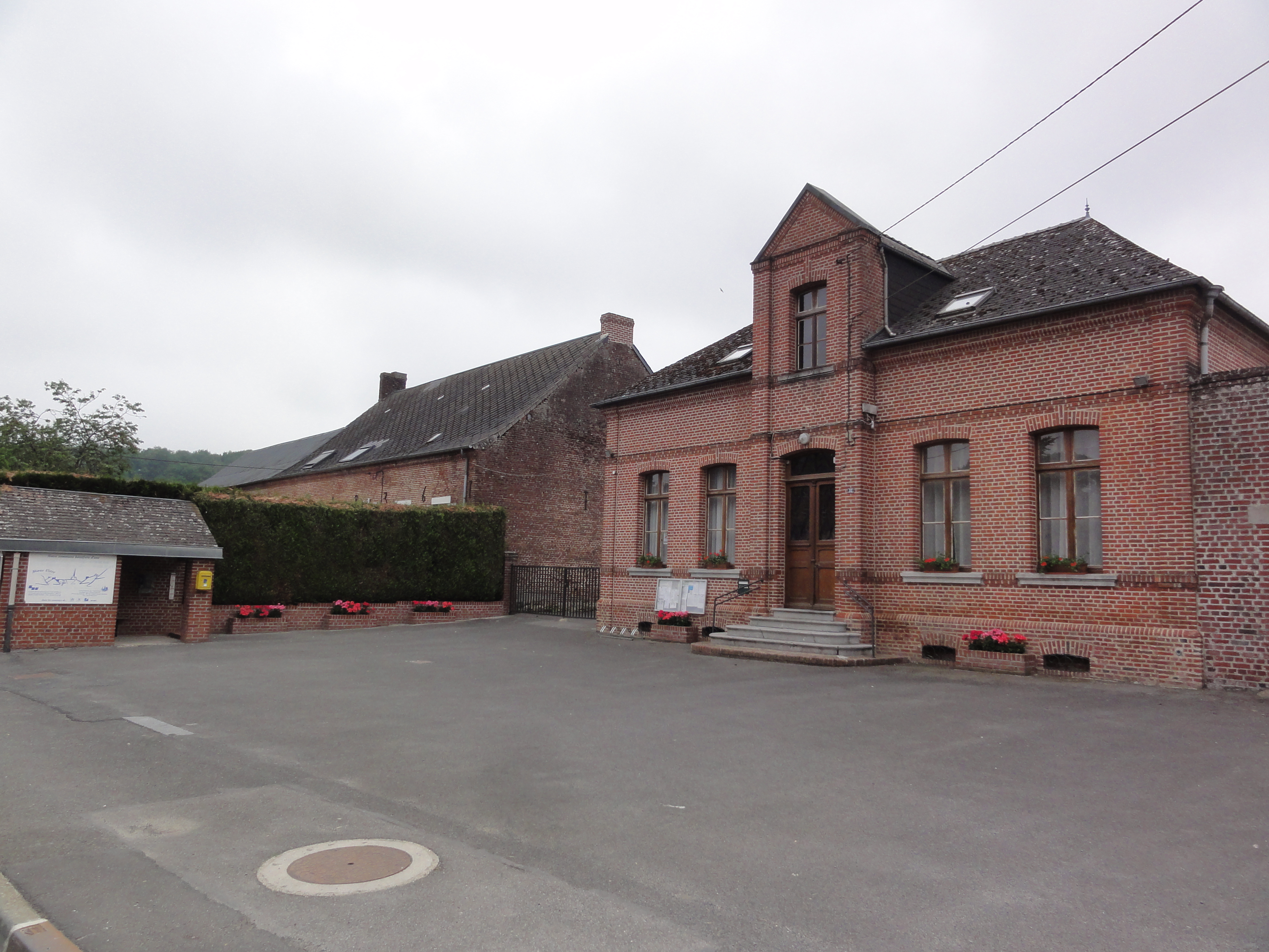 La Hérie (Aisne) mairie